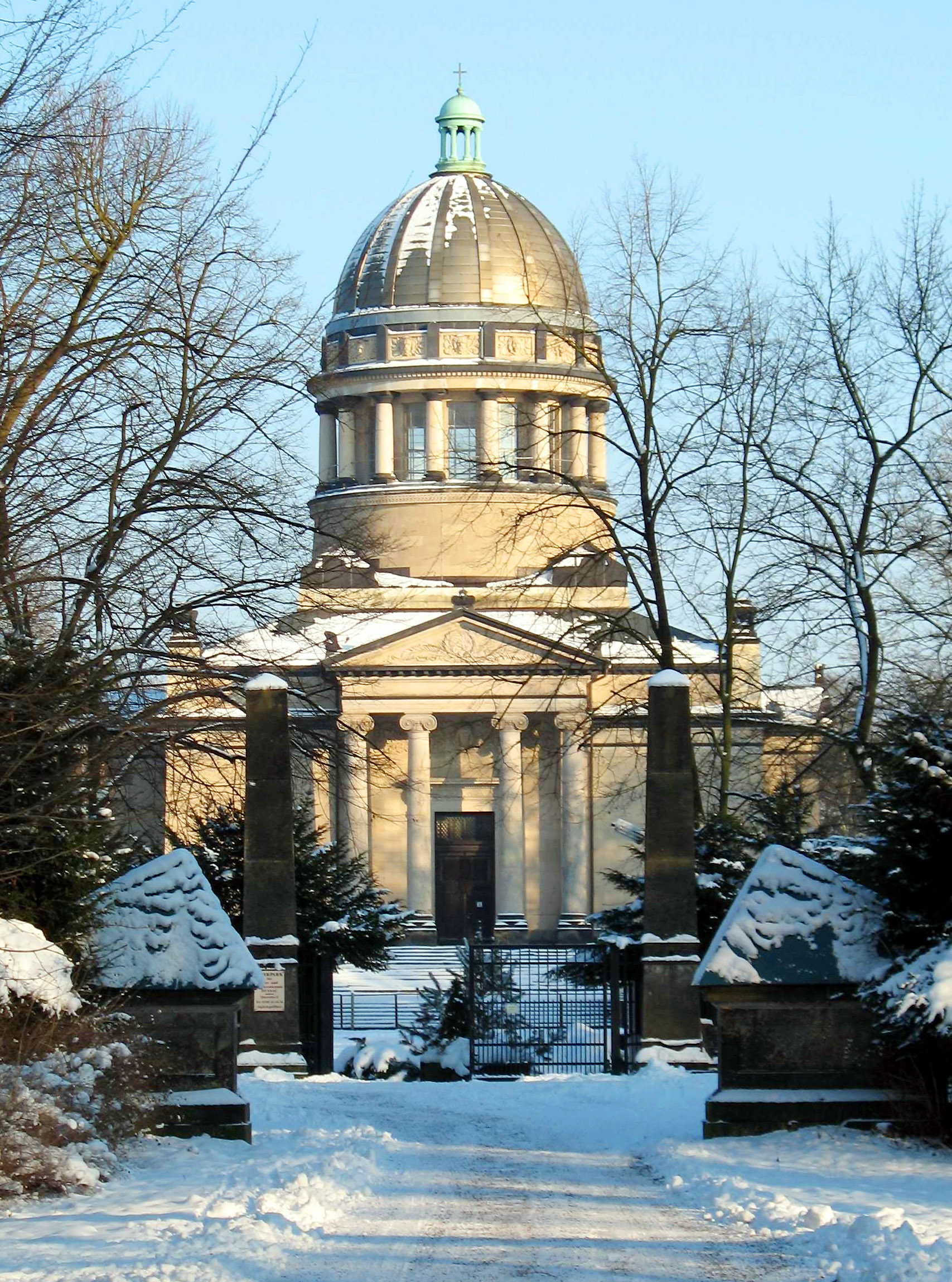 Mausoleum im Georgengarten Dessau